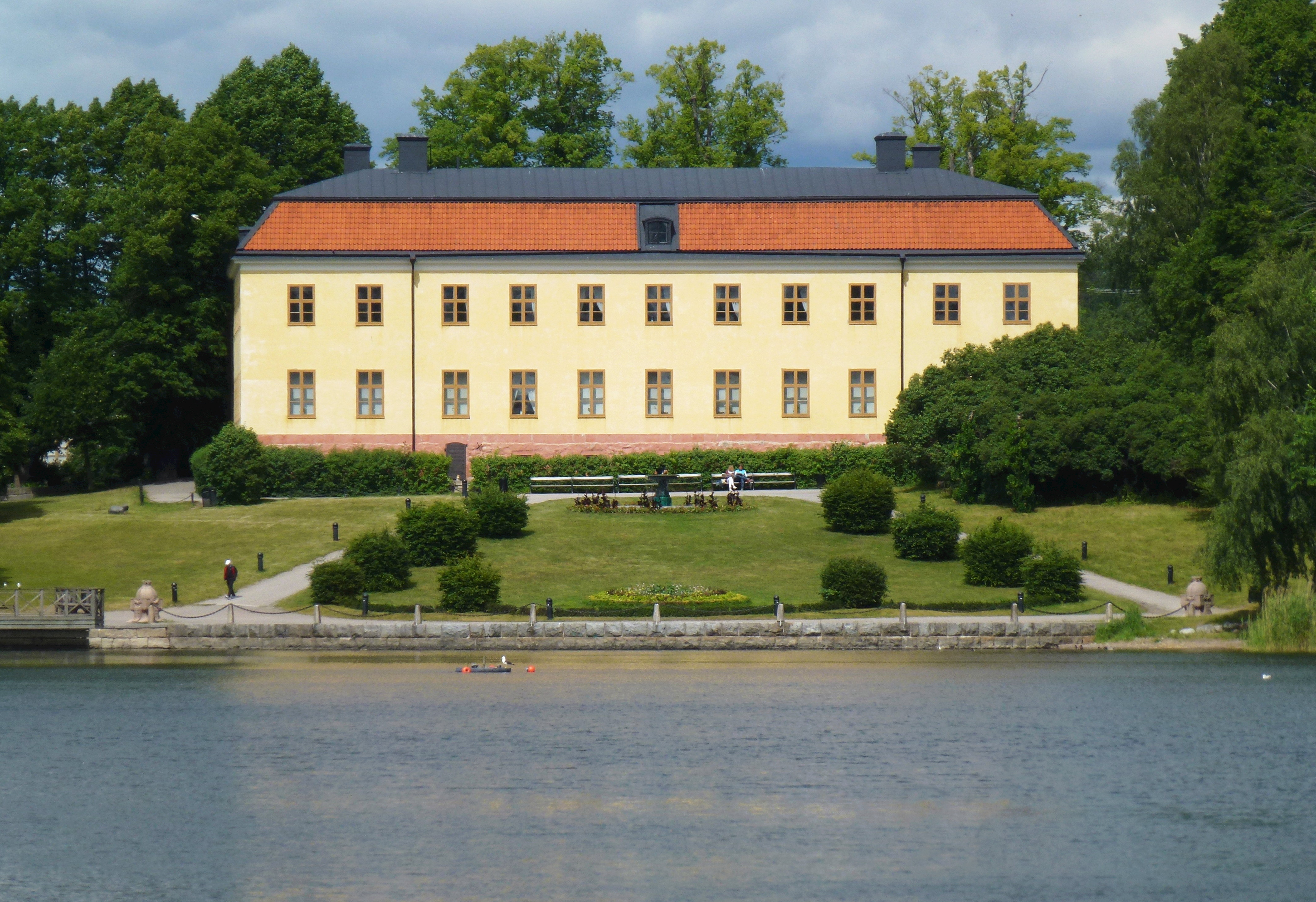 Edsbergs slott , sydsida